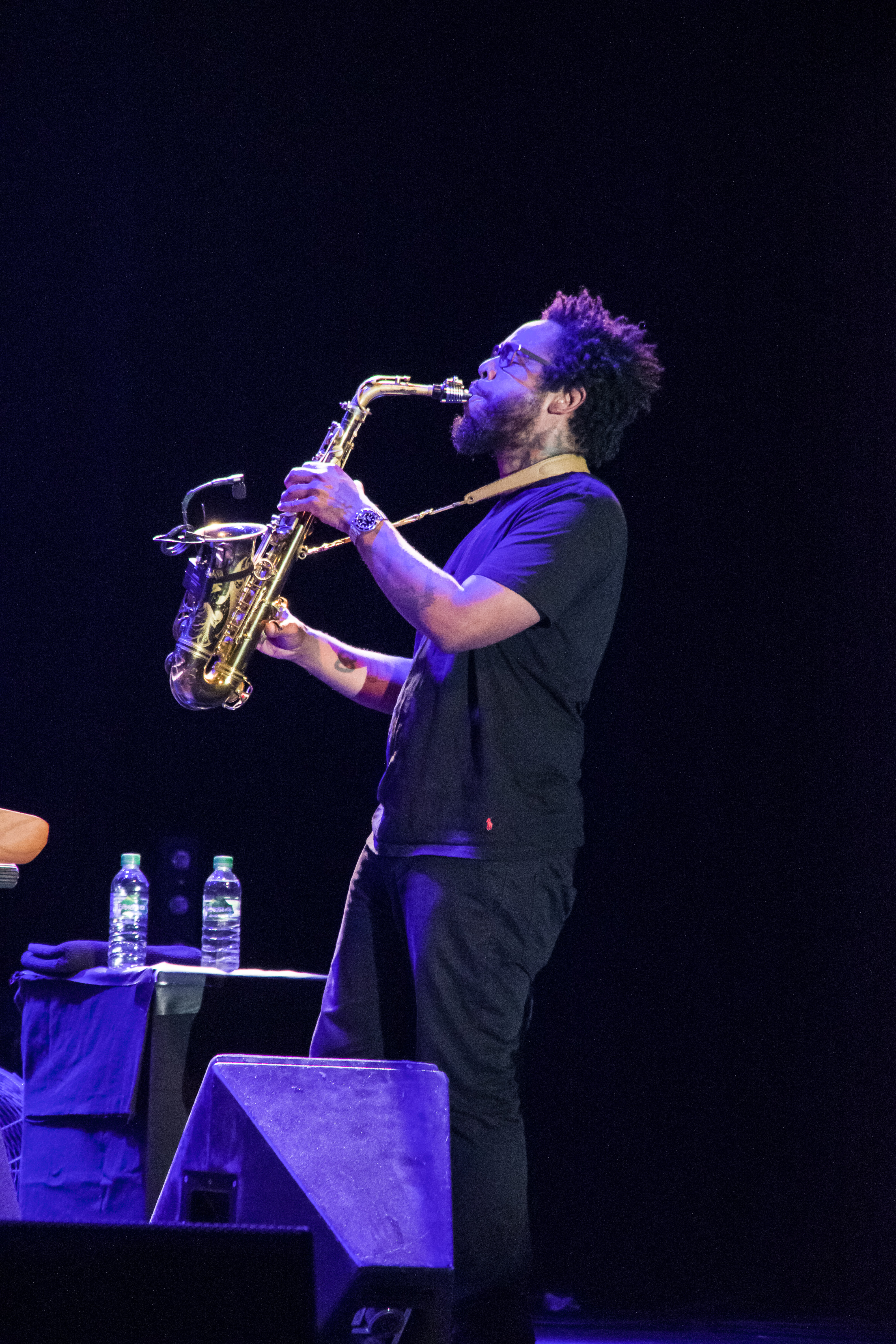 Das Zelt-Musik-Festival 2017 in Freiburg im Breisgau23.07.2017 Herbie Hancock und BandKeyboard, Saxophonː Terrace Martin